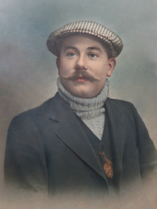 portrait de René Thomas